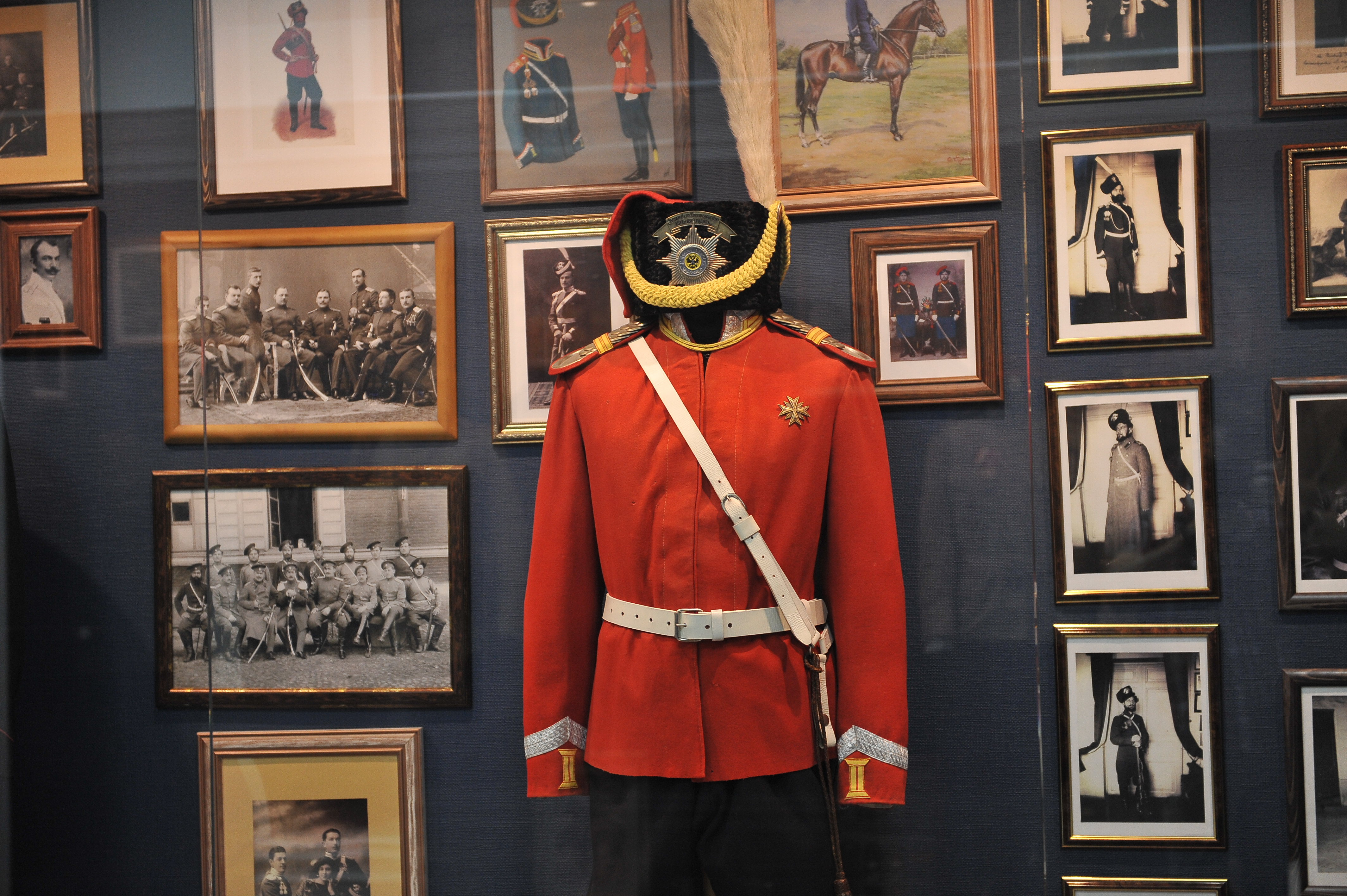 Витрина Культурно-выставочного центра «Донская казачья гвардия»